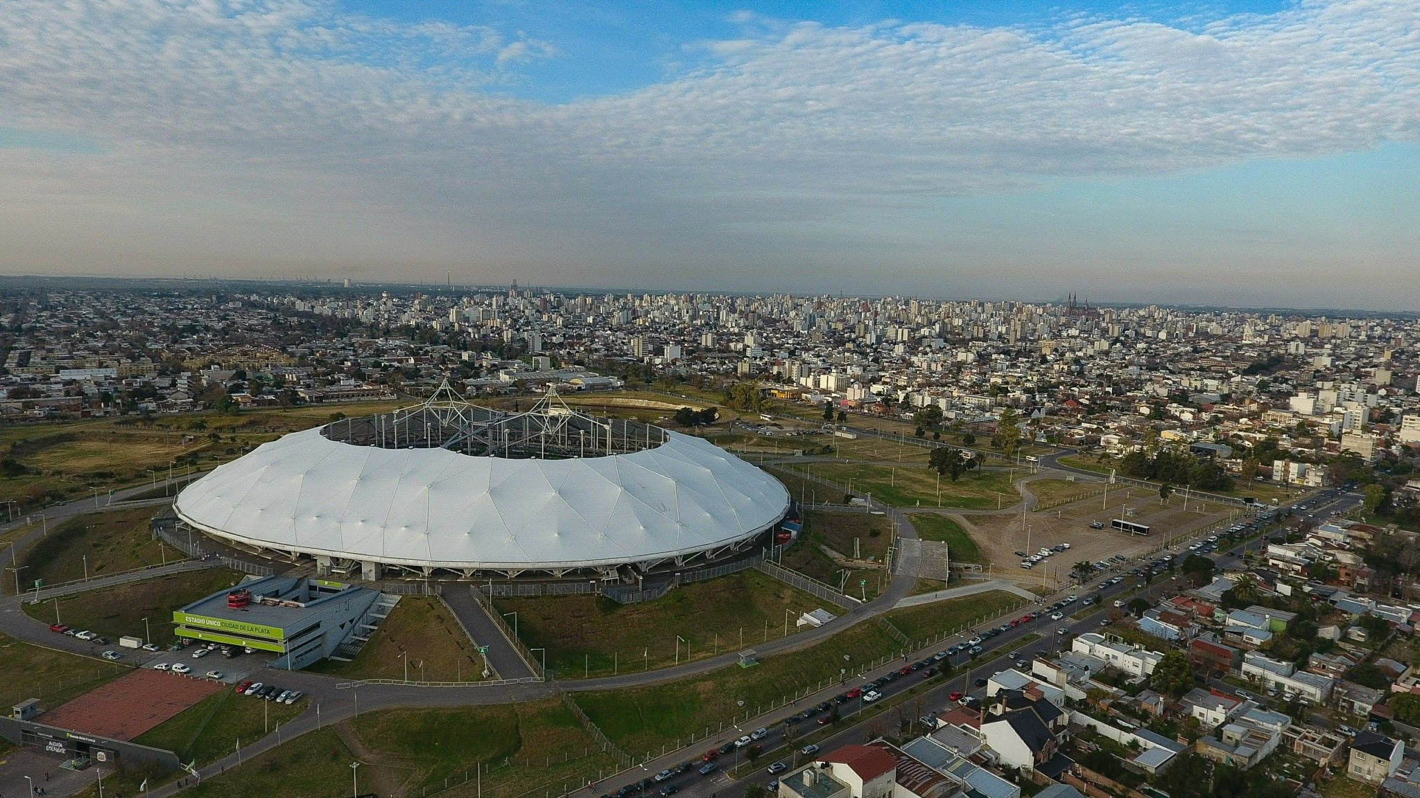 Vista desde drone